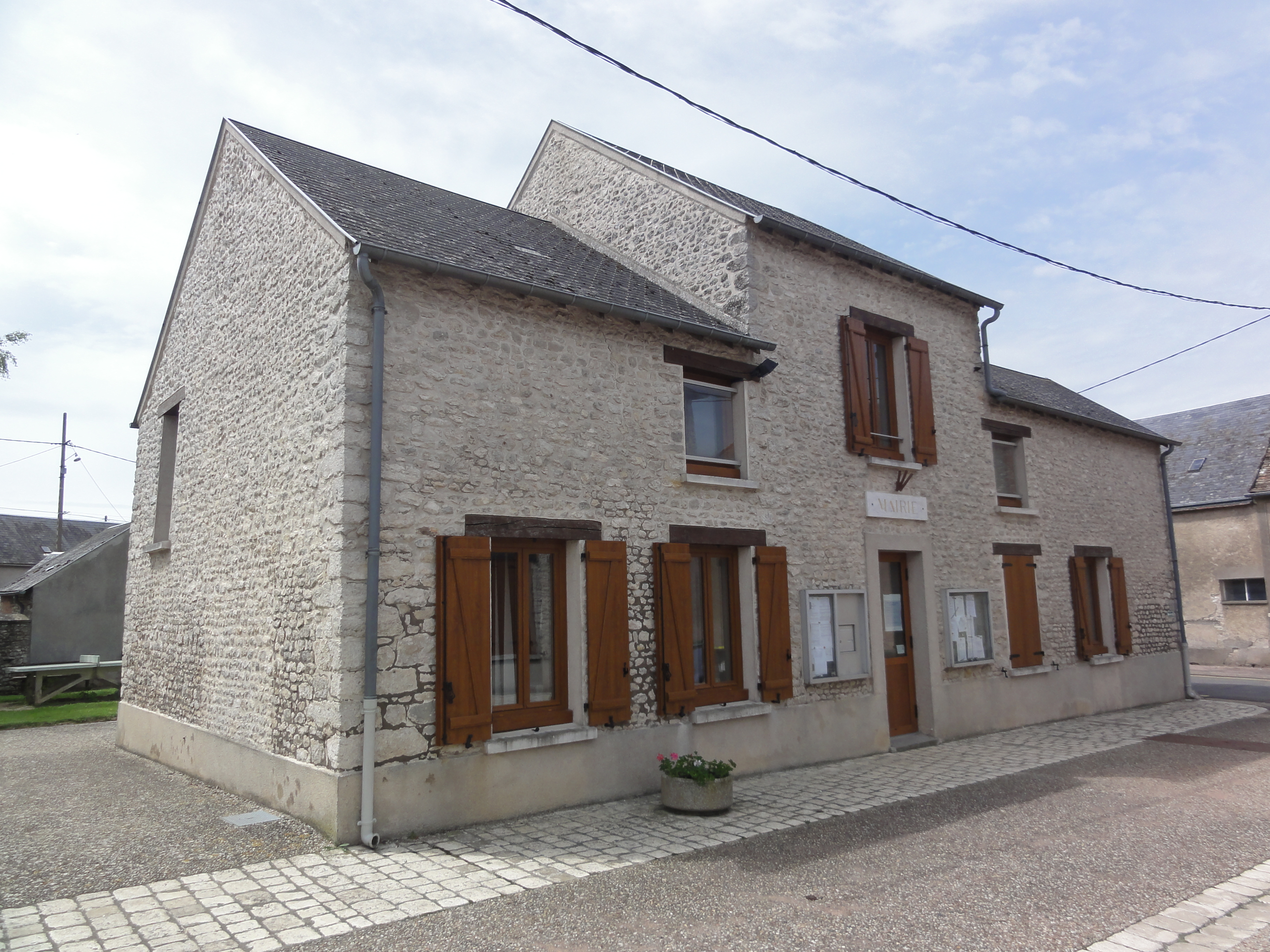 Boisseaux (Loiret) Mairie